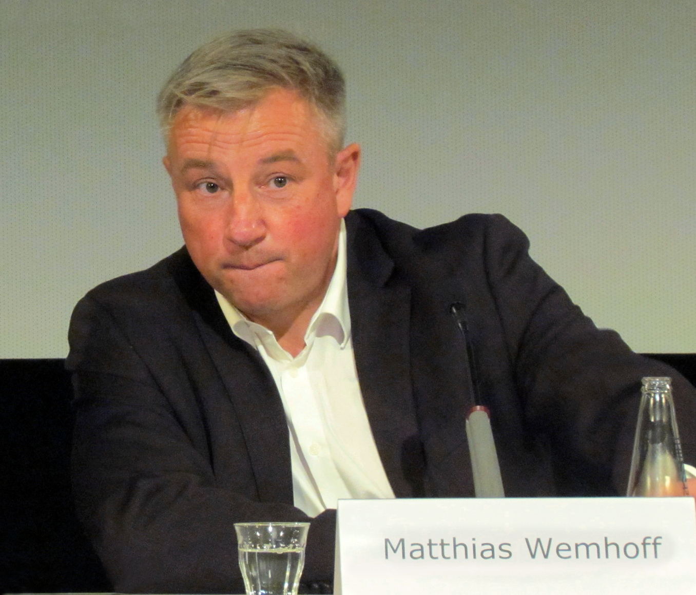 Matthias Wemhoff, Pressekonferenz zur Ausstellung "Bewegte Zeiten. Archäologie in Deutschland" in Berlin